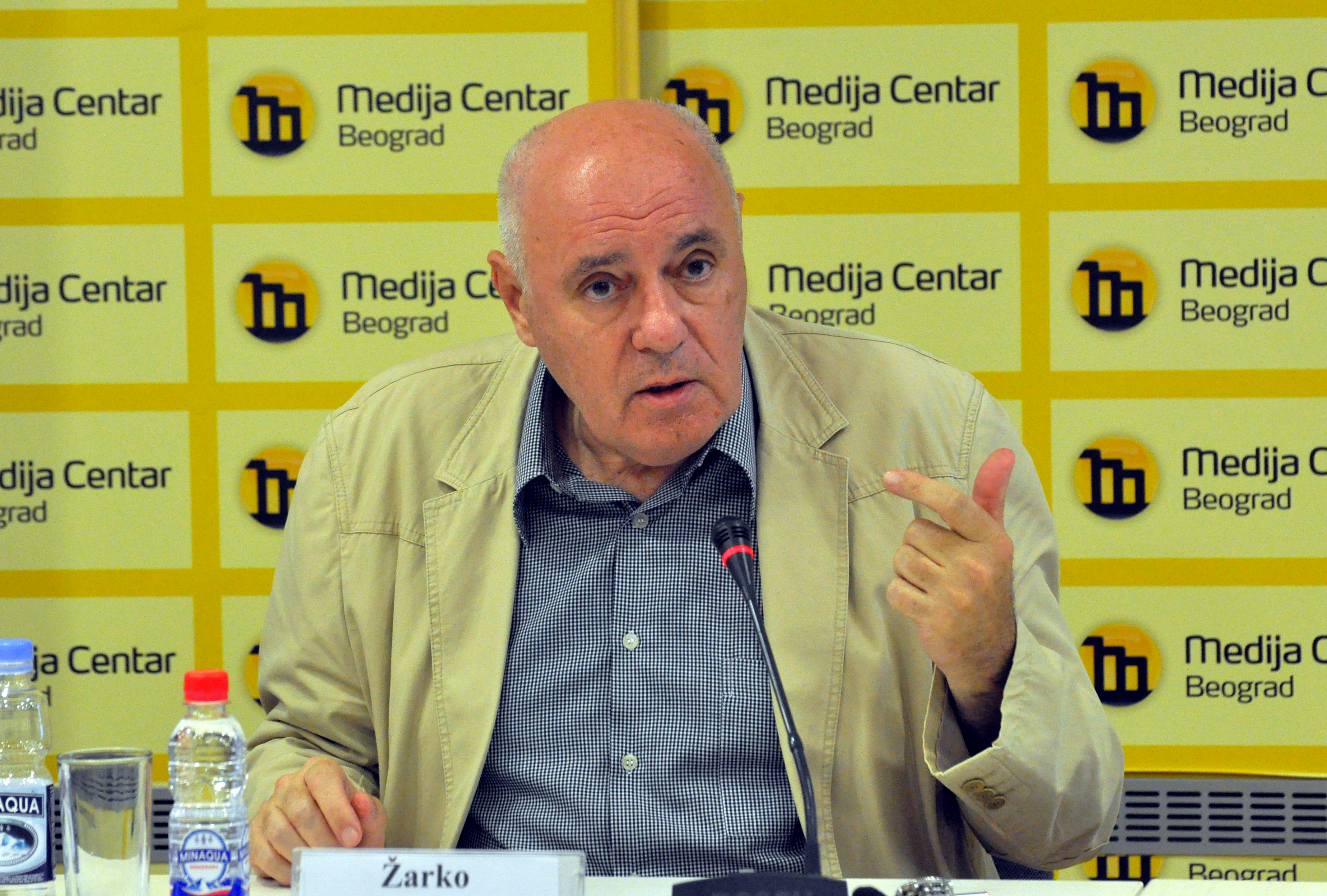 Жарко Пуховски хрватски филозоф